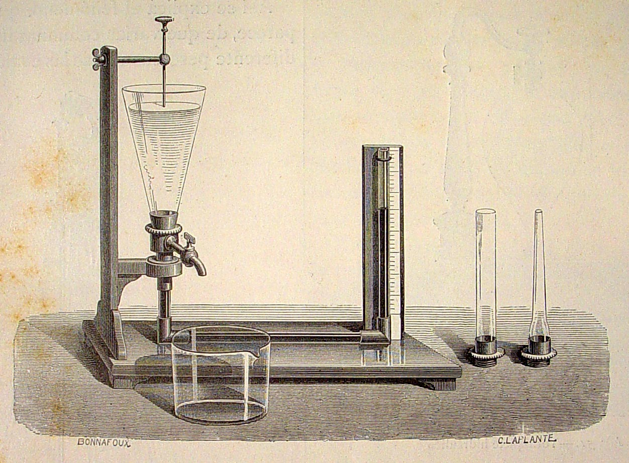 Ilustraciones pertenecientes al libro : El mundo físico : gravedad, gravitación, luz, calor, electricidad, magnetismo, etc. / A. Guillemin. - Barcelona Montaner y Simón, 1882